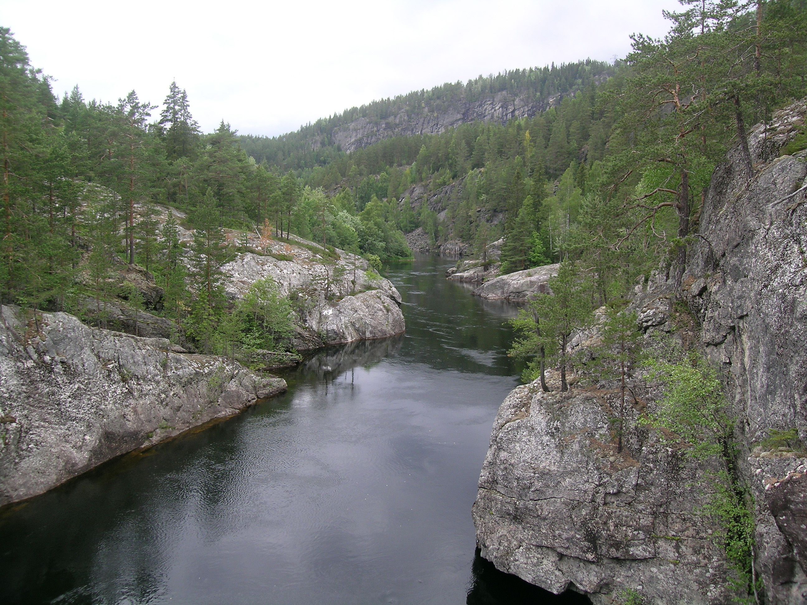 Numedalslågen at Djupdal, Rollag